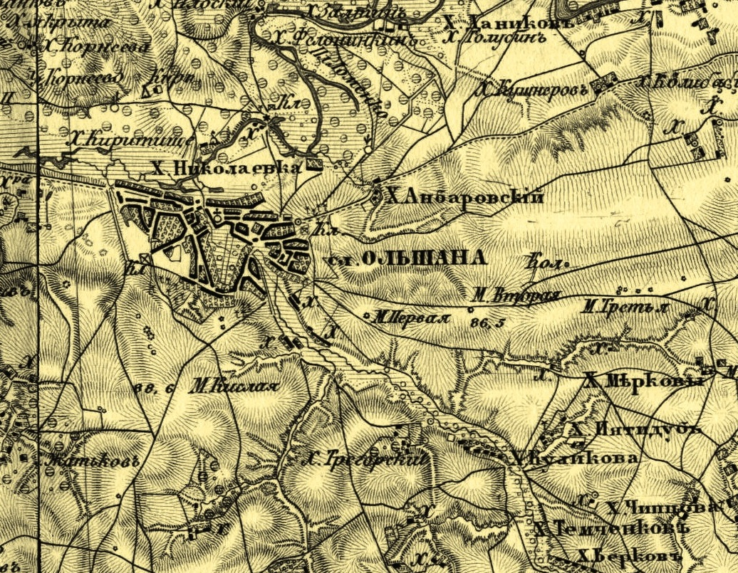 Ольшана и близлежащие хутора времён Российской Империи